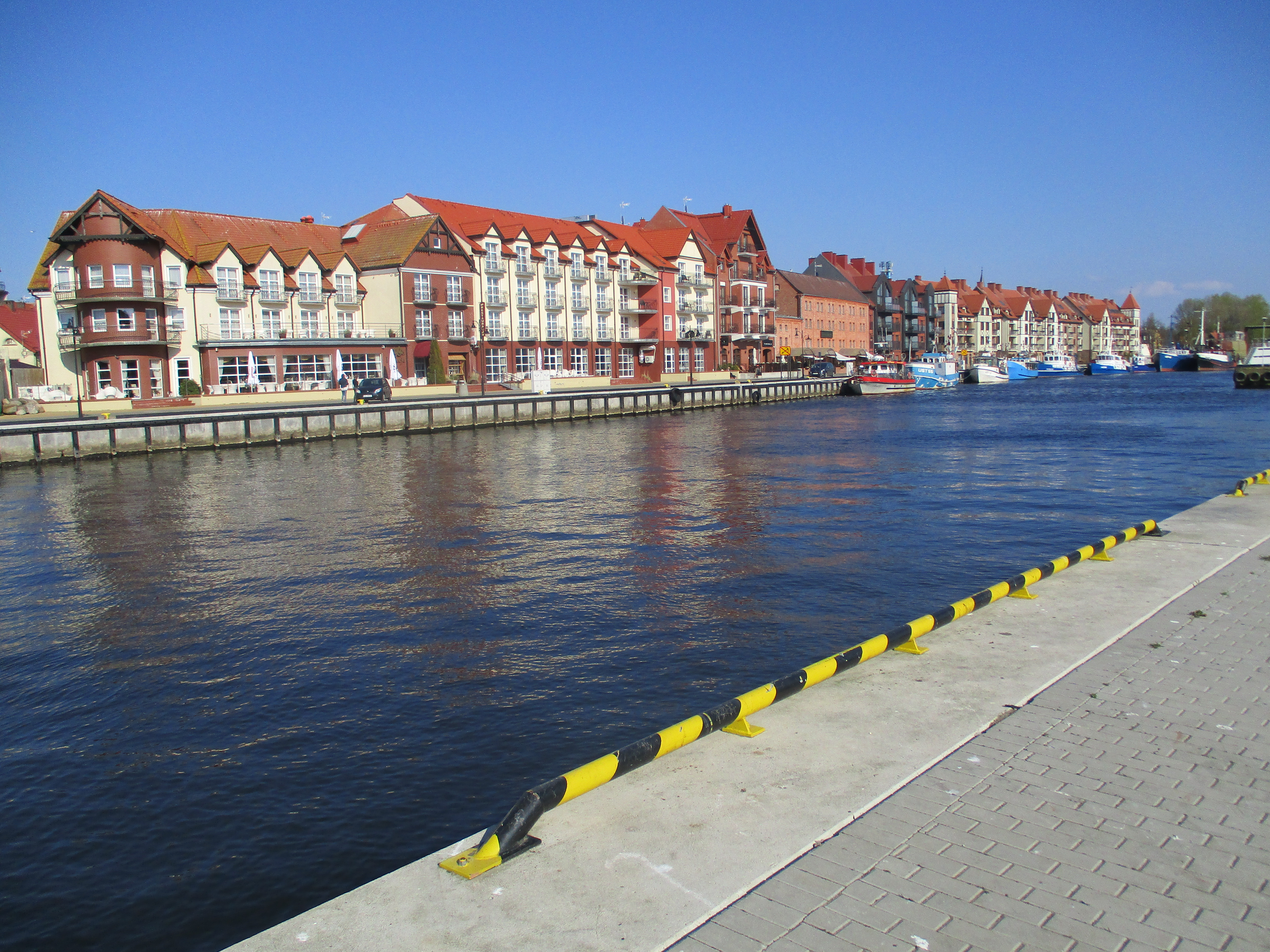 Ustka, port, zabudowa wschodnia